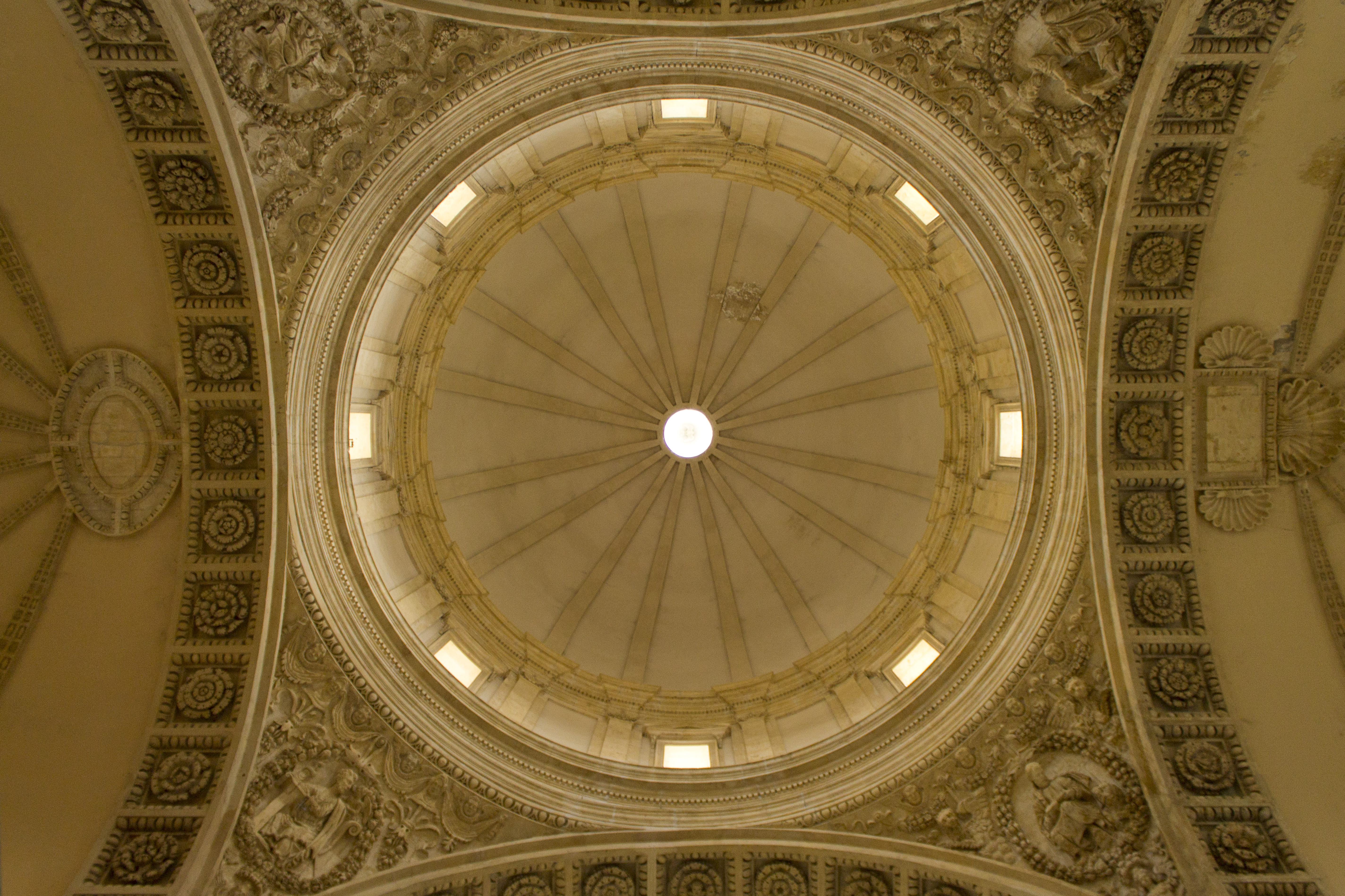 Tempio di Santa Maria della Consolazione This is a photo of a monument which is part of cultural heritage of Italy.